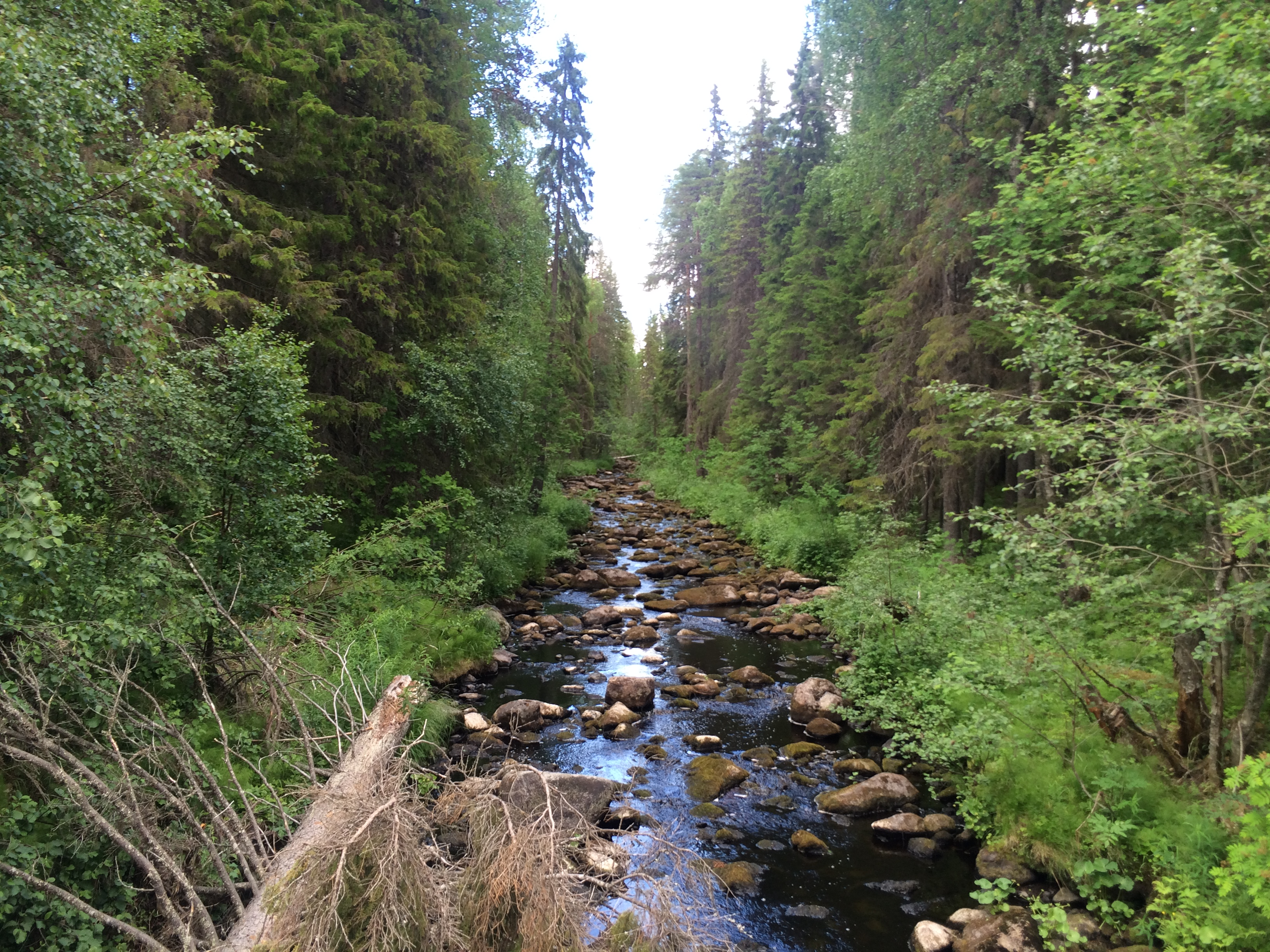 Шигеренджа